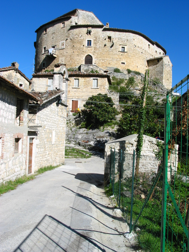 Acquasanta Terme, Marche, Italia